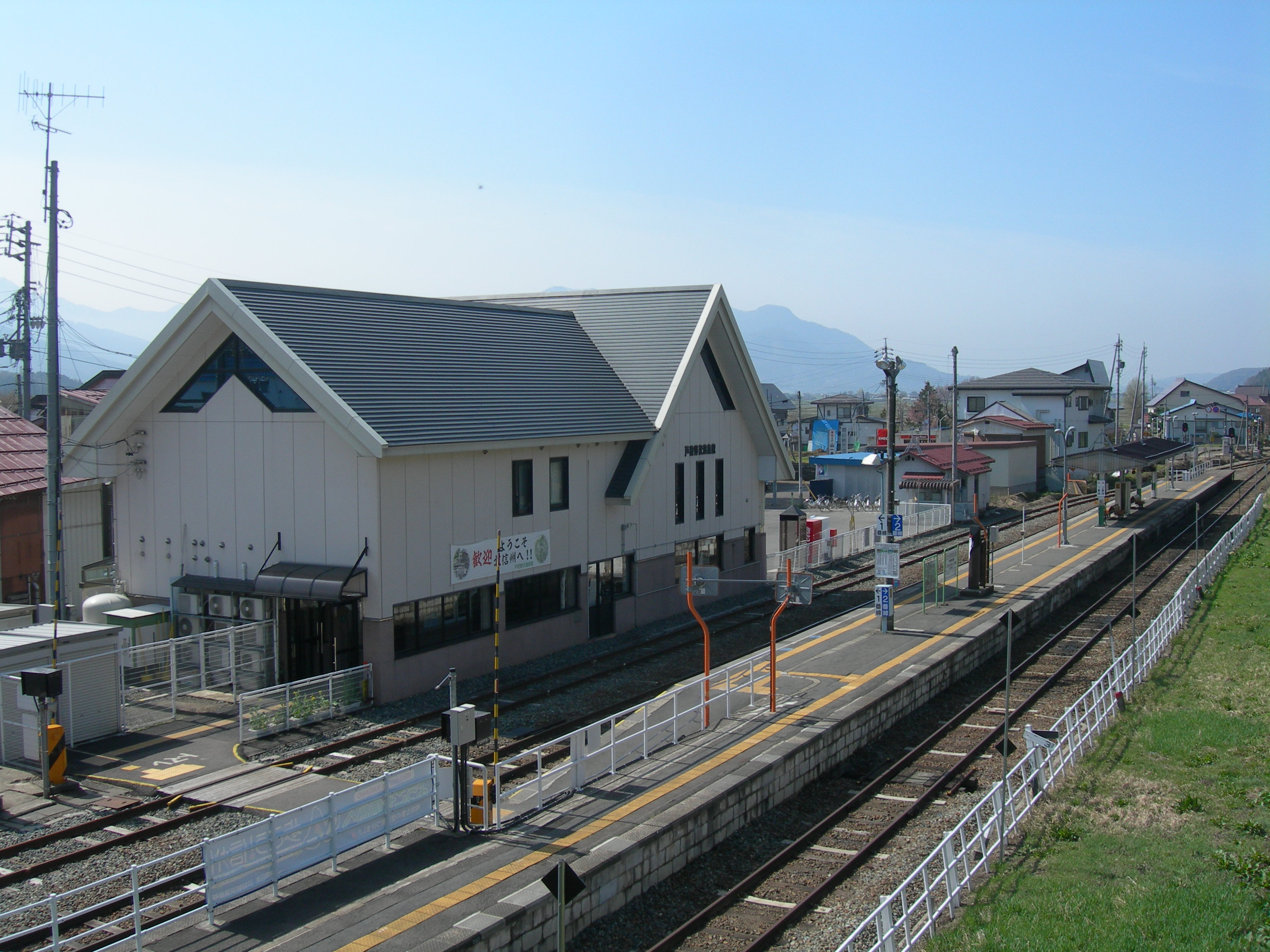 JR戸狩野沢温泉駅ホーム